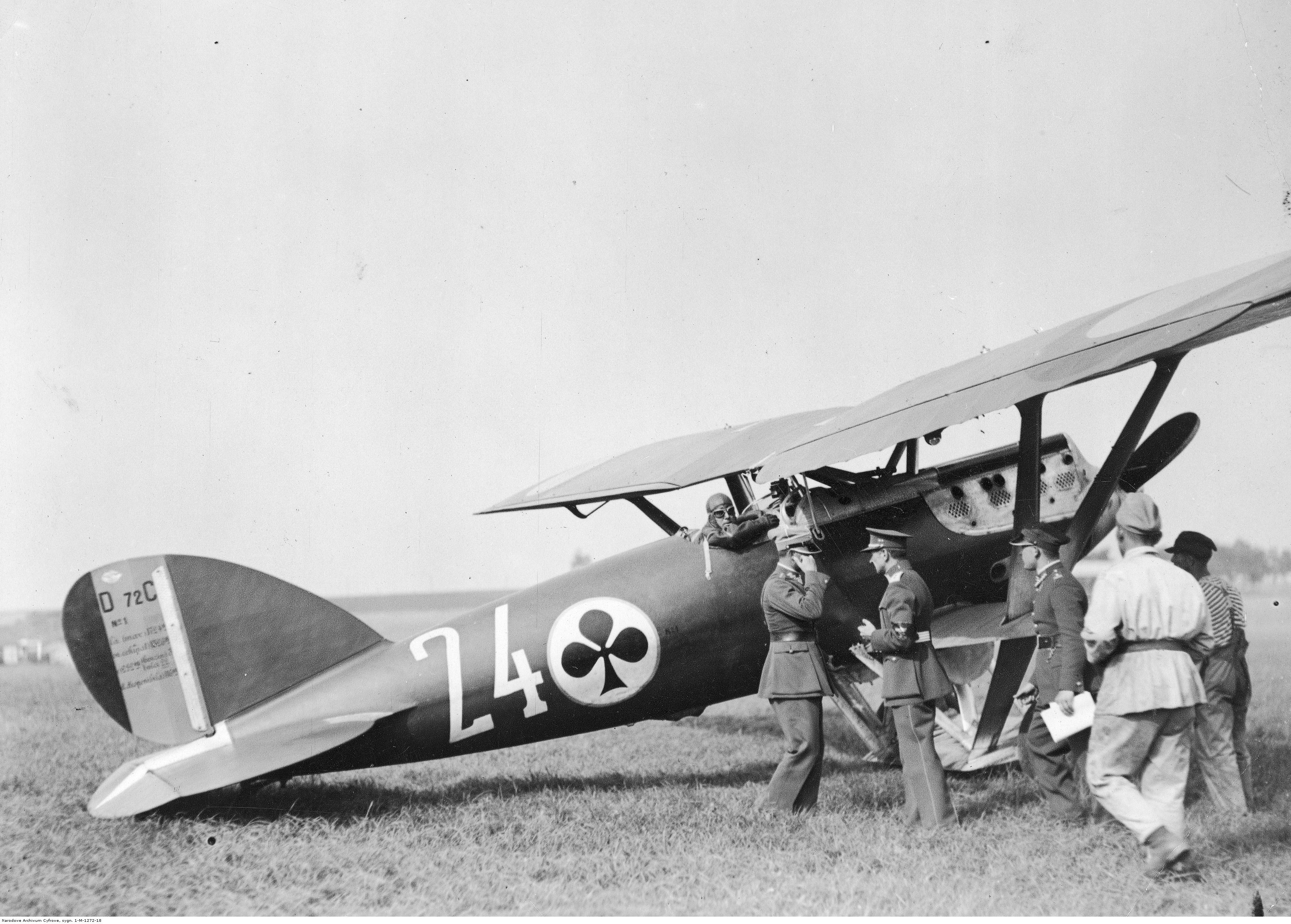 Uczestnicy rajdu lotniczego Małej Ententy i Polski podczas postoju na lotnisku w Rakowicach. Na zdjęciu porucznik pilot G. Stefanesco w samolocie Nieuport Delage NiD.72C1.